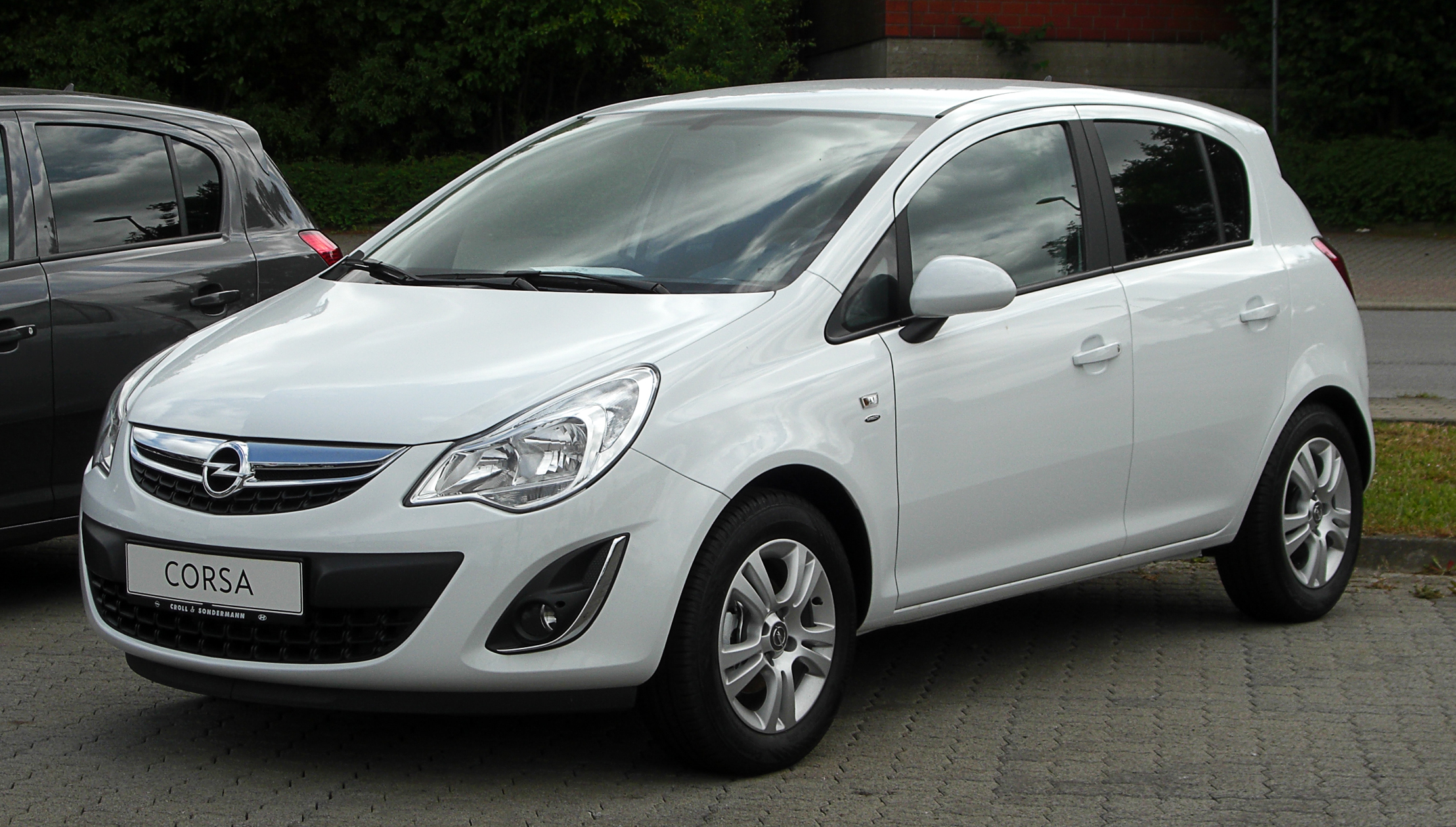 Opel Corsa 1.2 ecoFLEX Satellite (D, Facelift)